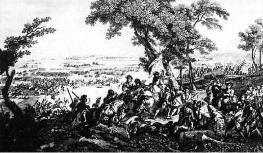 Bild des Gefechts am Käferholz mit Blick in die Ebene von Friedlingen, die zum Schlachtfeld gehörte